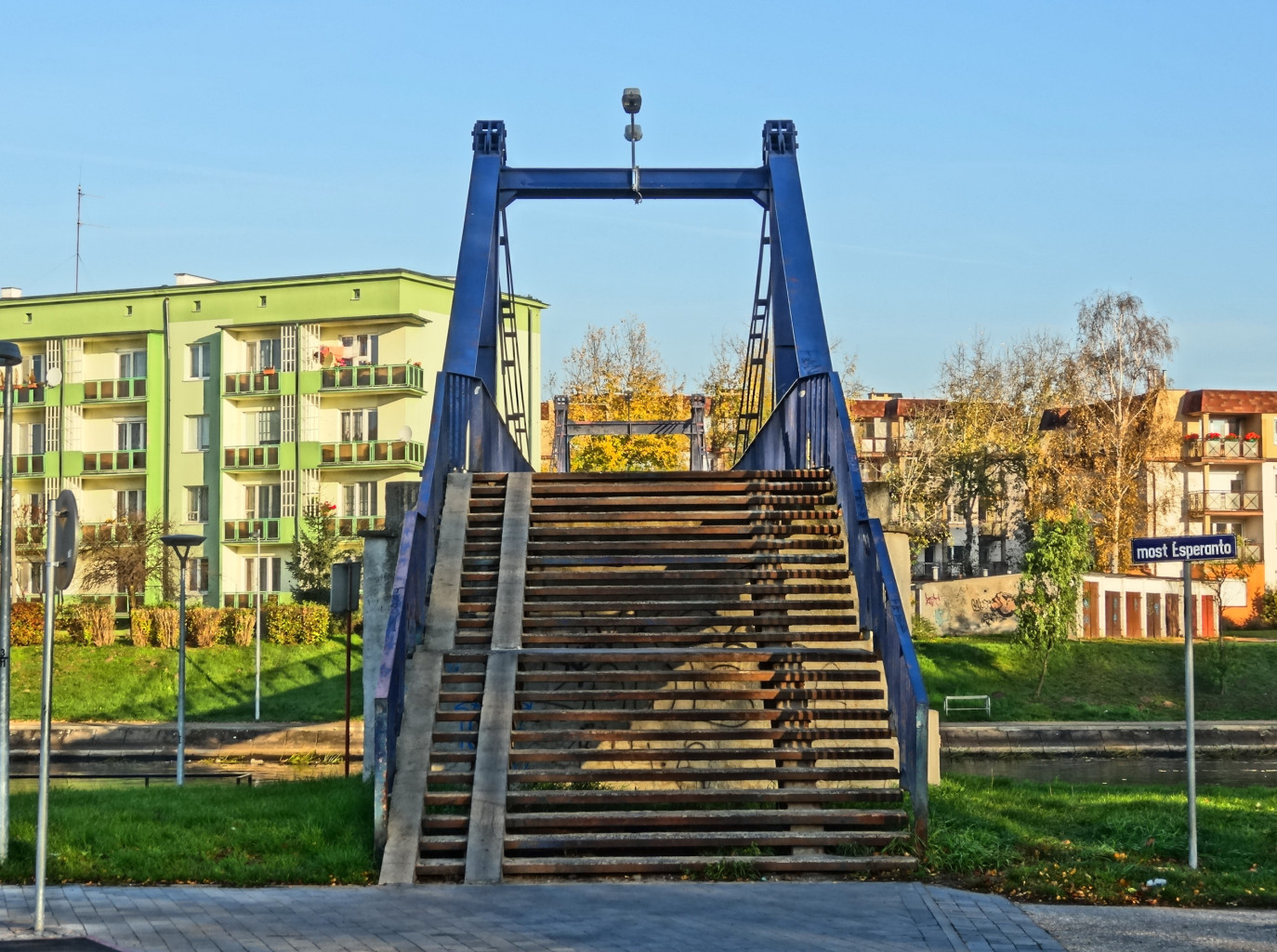 Kładka dla pieszych im. Esperanto przez Brdę w Bydgoszczy